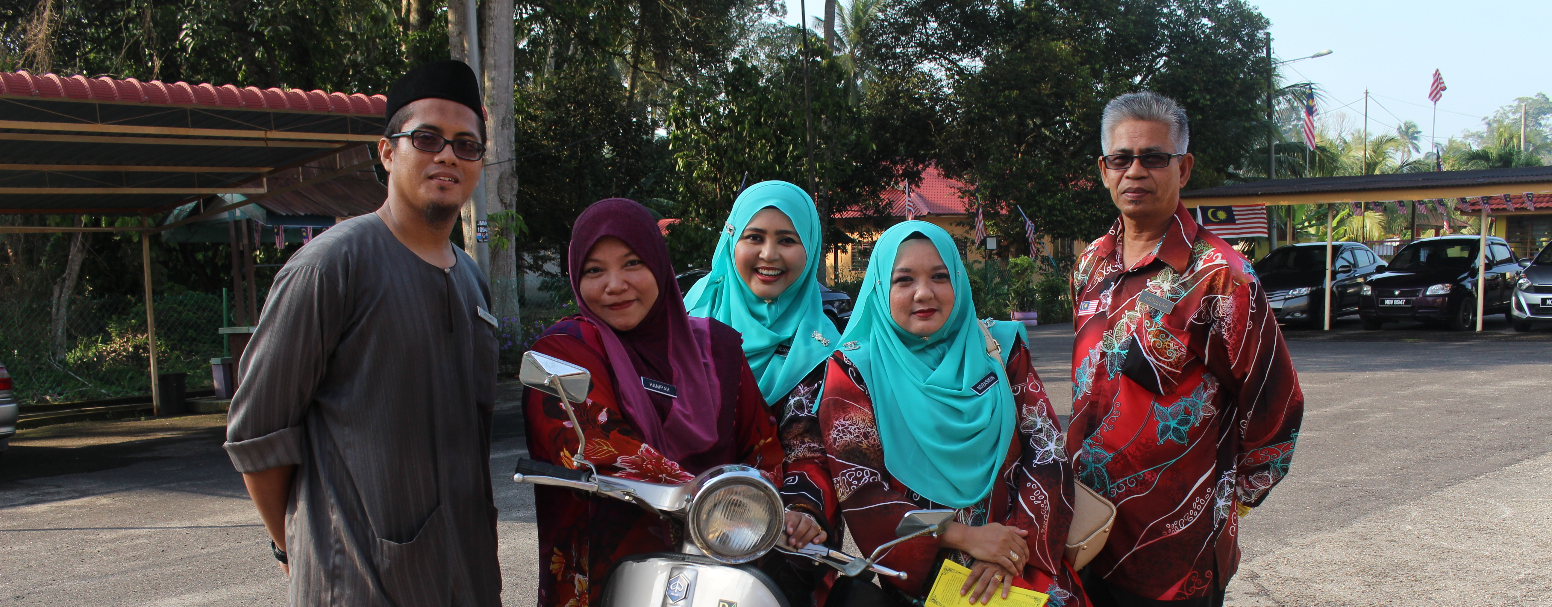 Cikgu Abdullah Bersama Cikgu Rizan, Cikgu Hanipah, Cikgu Marlianah Dan Cikgu Norasikin